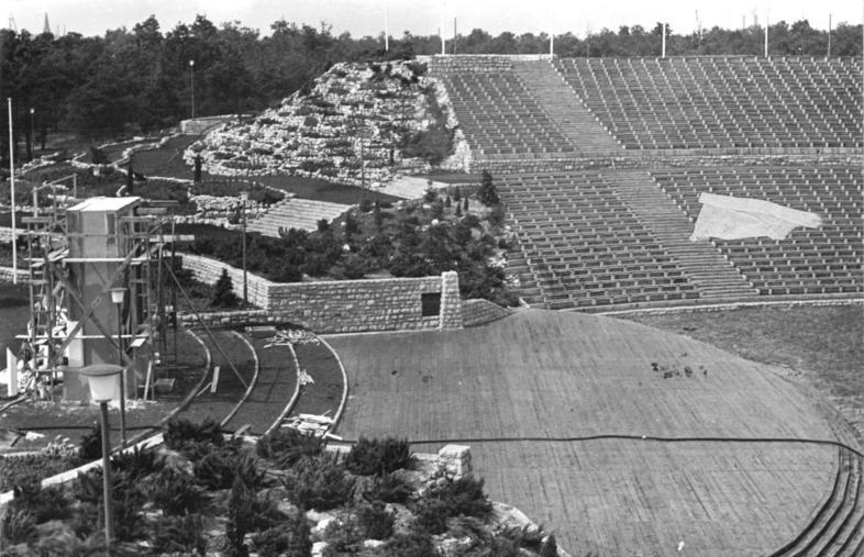 Berlin, Wuhlheide, Freilichtbühne Illus Funck 24.7.51 Pionierrepublik "Ernst Thälmann" in der Wuhlheide. UBz: Blick auf die Freilichtbühne. (aufgen.: am 24.7.51)